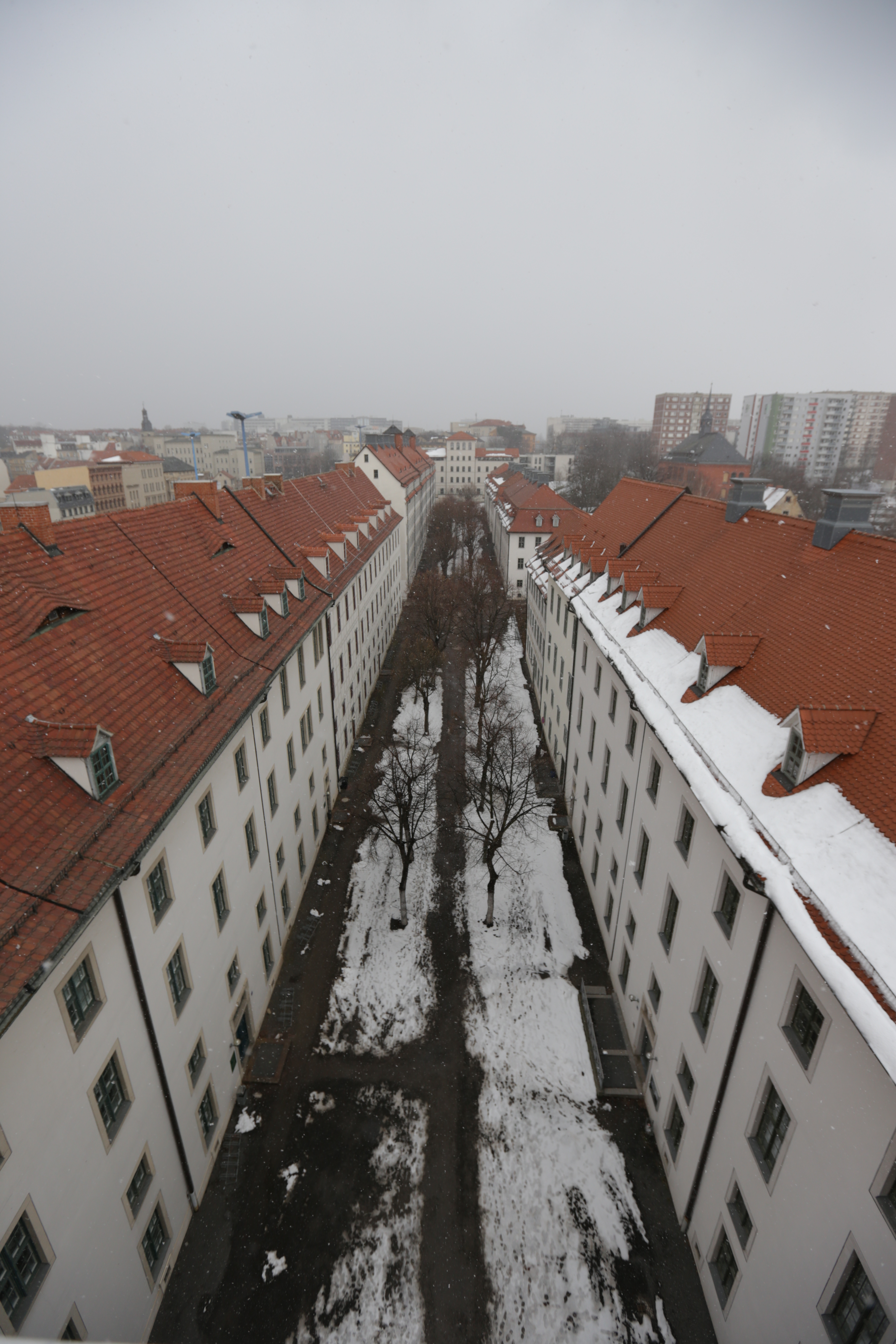 Franckesche Stiftungen in Halle/Saale, Blick in den Lindenhof vom Dach des Historischen Waisenhauses